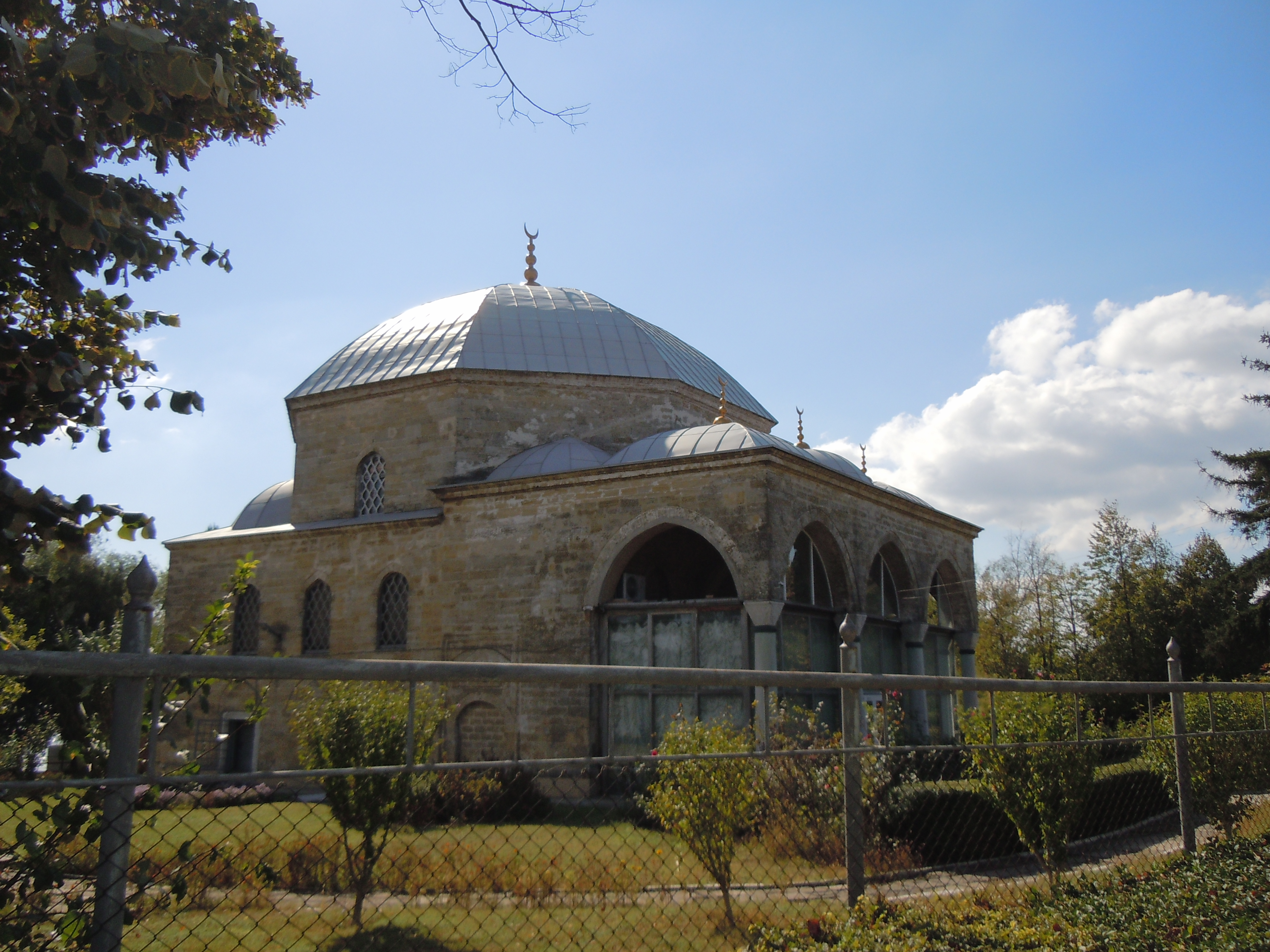 Хресто-Воздвиженська церква (Мала мечеть), Ізмаїл, Кріпосна вул., 1а (територія фортеці)